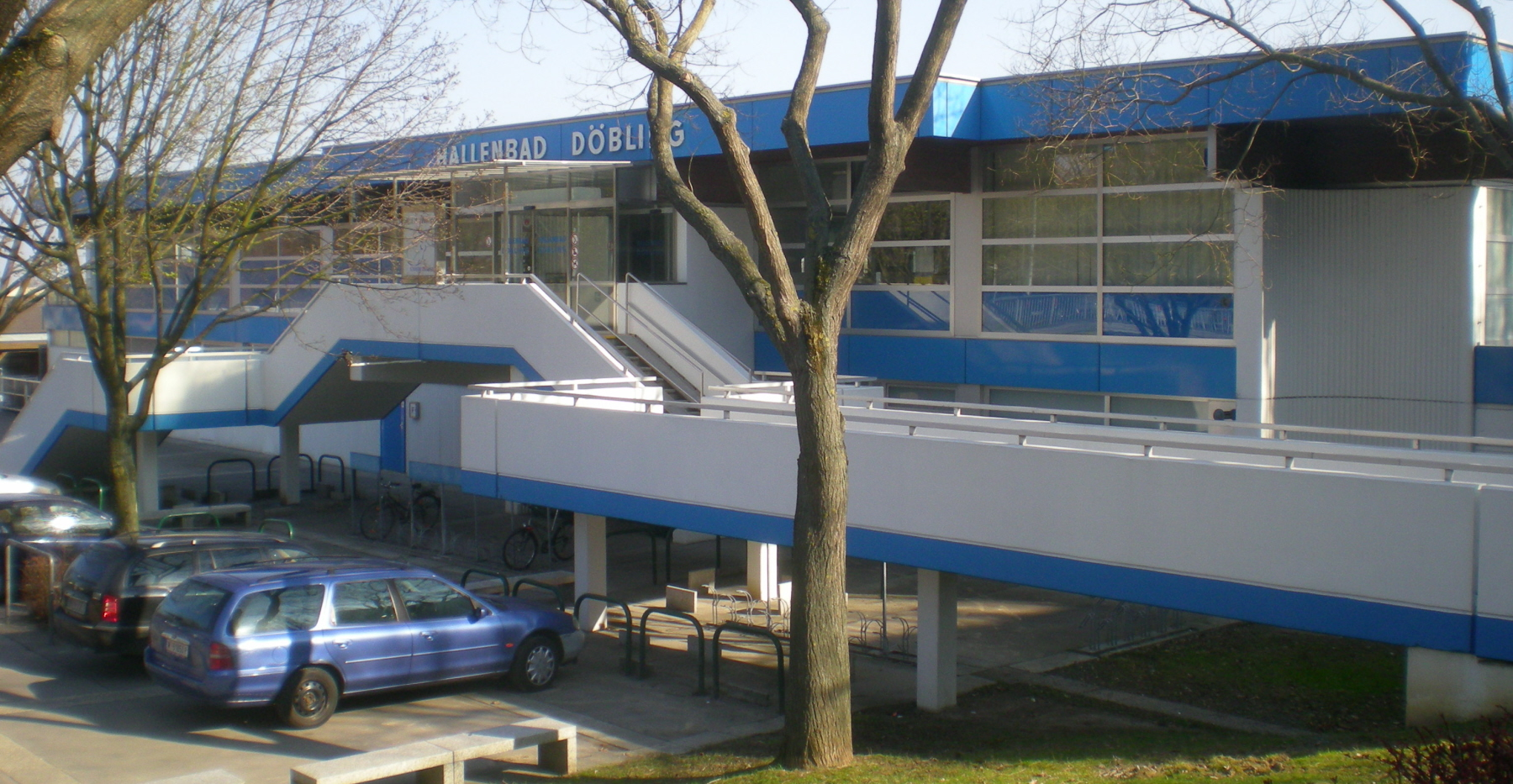 Das städtische Hallenbad Döbling in Wien